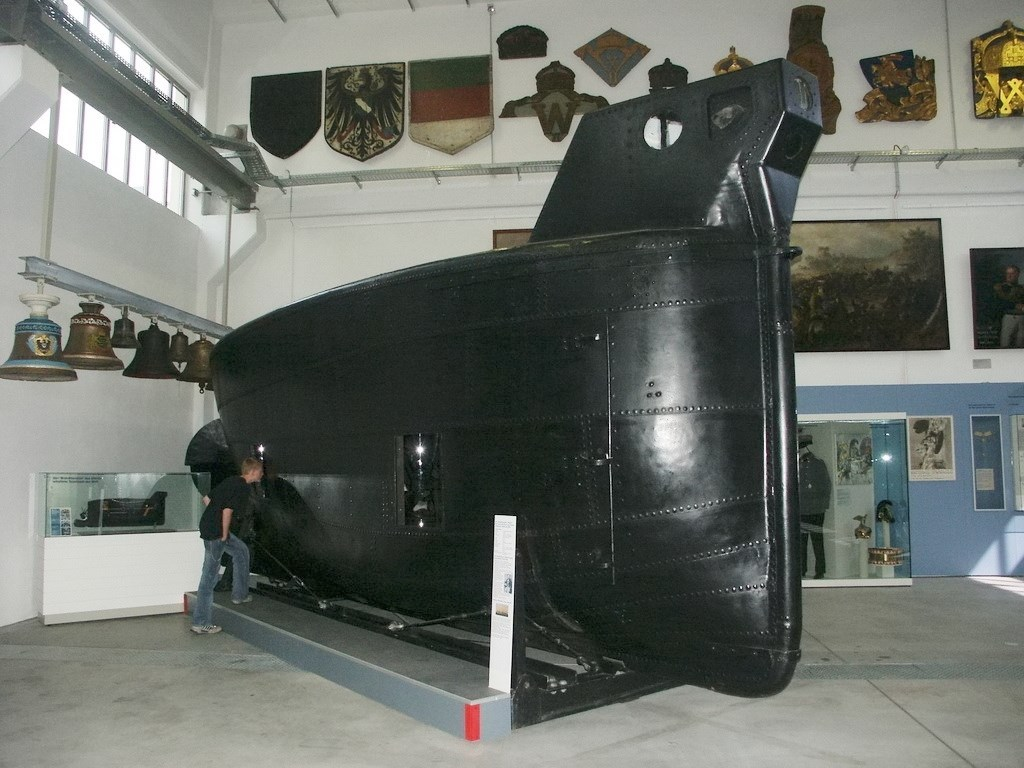 Bundeswehrmuseum Dresden mit Teilen von der NVA